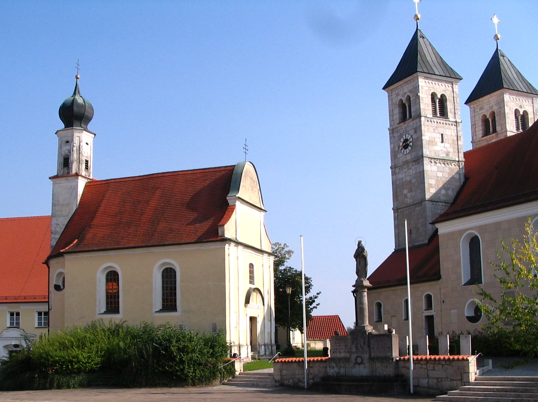 Markt Pförring, Landkreis Eichstätt, Oberbayern: Sebastiankapelle